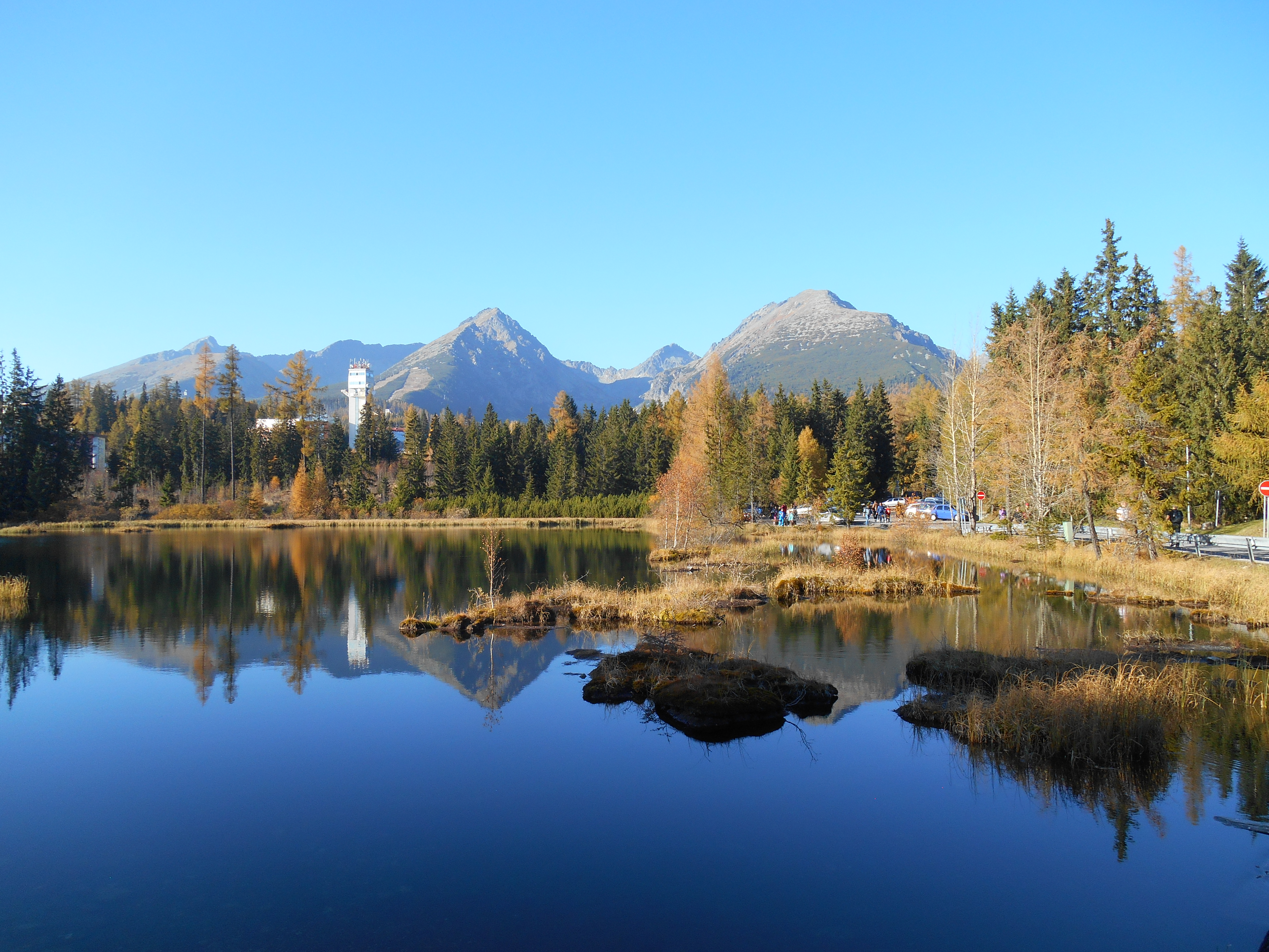 Slovensko Vysoké Tatry Nové Štrbské Pleso